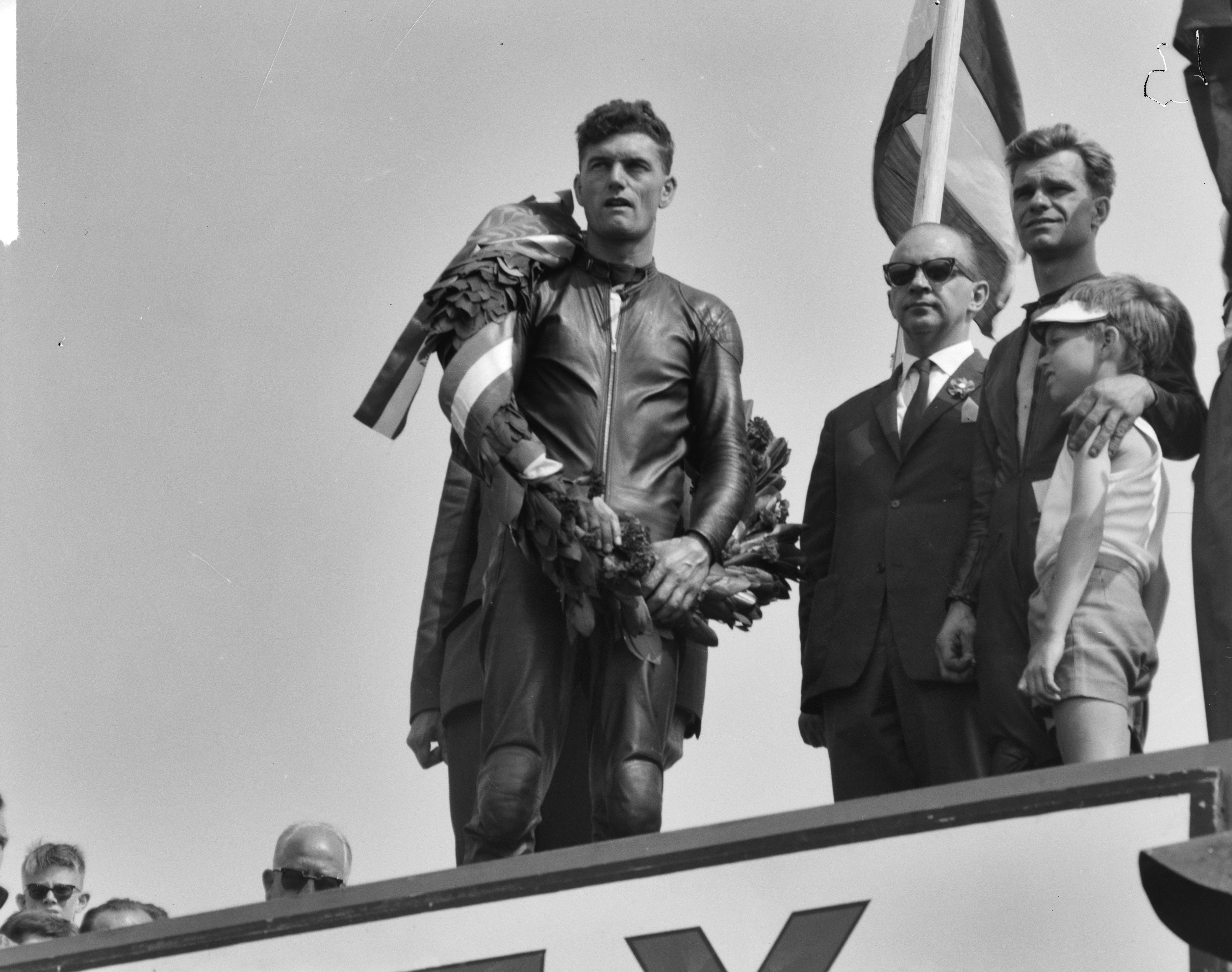 Collectie / Archief : Fotocollectie Anefo Reportage / Serie : TT Assen 1964 Beschrijving : Huldiging. Jim Redman (links). Rechts Cees van Dongen (beste Nederlander) Datum : 27 juni 1964 Locatie : Assen Trefwoorden : motorsport Persoonsnaam : Dongen, Cees van, Redman, Jim Instellingsnaam : TT Fotograaf : Bilsen, Joop van / Anefo Auteursrechthebbende : Nationaal Archief Materiaalsoort : Negatief (zwart/wit) Nummer archiefinventaris : bekijk toegang 2.24.01.04 Bestanddeelnummer : 916-5925